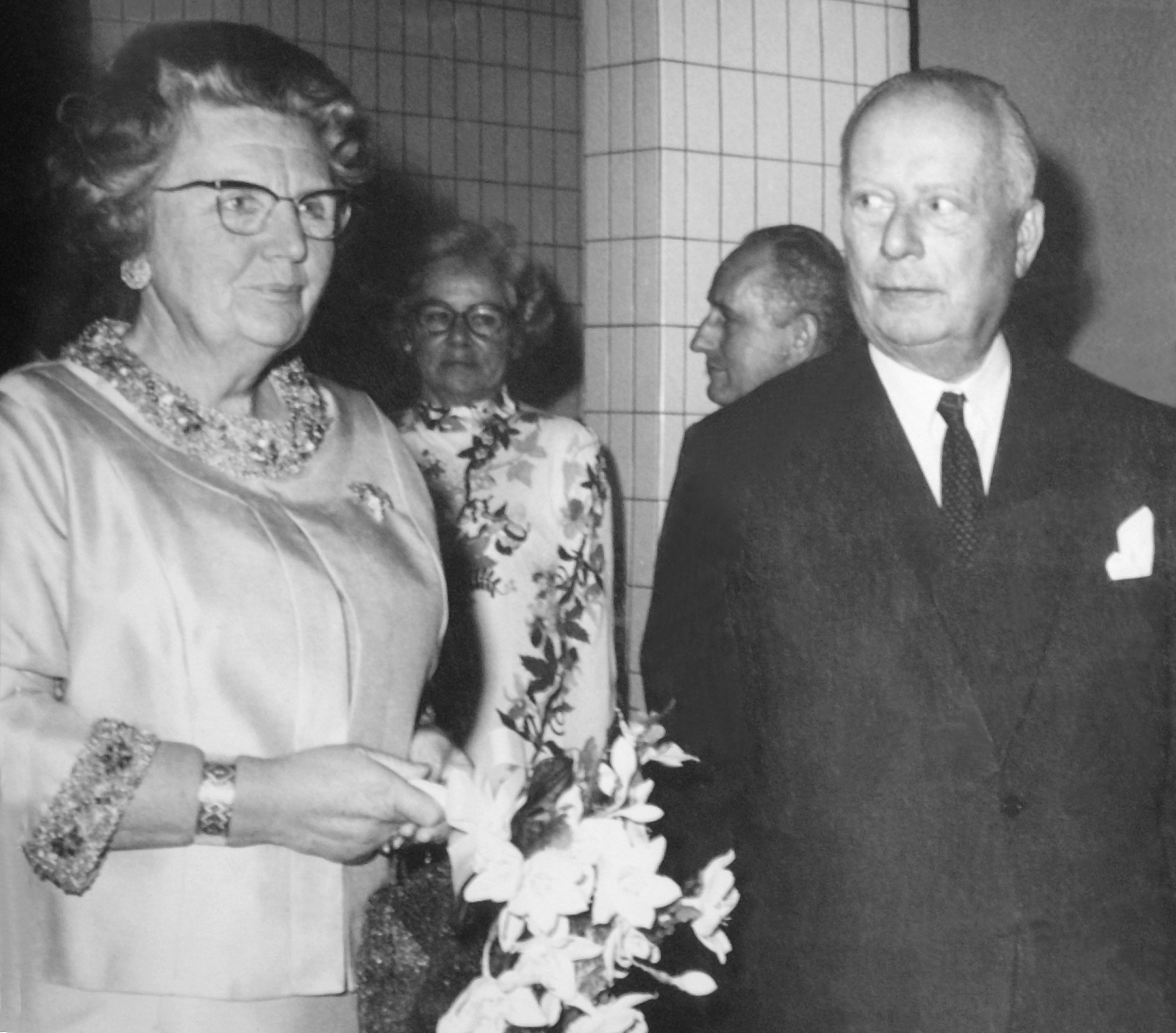 Koningin Juliana op de première van "Dood in Venetië" in Cineac AD in Rotterdam